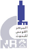 رمز المركز القومي للبحوث